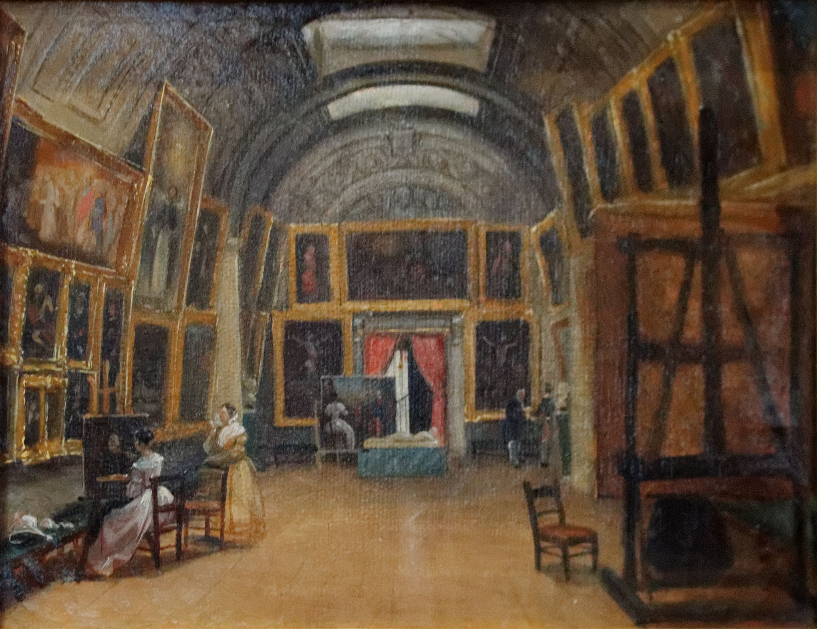 Alexandre Aguado, marquis de Las Marismas (1784-1842), banquier d'origine espagnole installé à Paris, était l'une des premières fortunes d'Europe sous la Monarchie de Juillet. Il constitua en quelques années une collection riche de plus de 500 tableaux, dont les deux tiers de l'école espagnole. Installée dans sa résidence parisienne (l'actuelle mairie du 9e arrdt.), elle était libéralement ouverte au public et permit aux artistes français de découvrir la peinture espagnole du Siècle d'or.